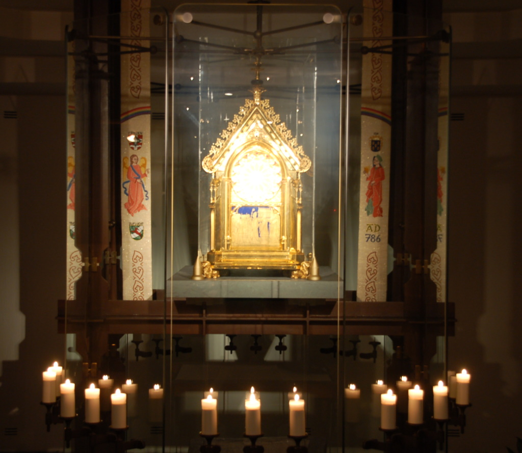 Ida-Schrein in der Krypta der St. Idakirche in Herzfeld (Westf.)